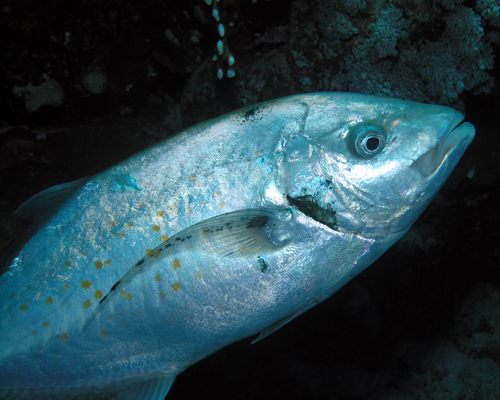 Carangoides bajad